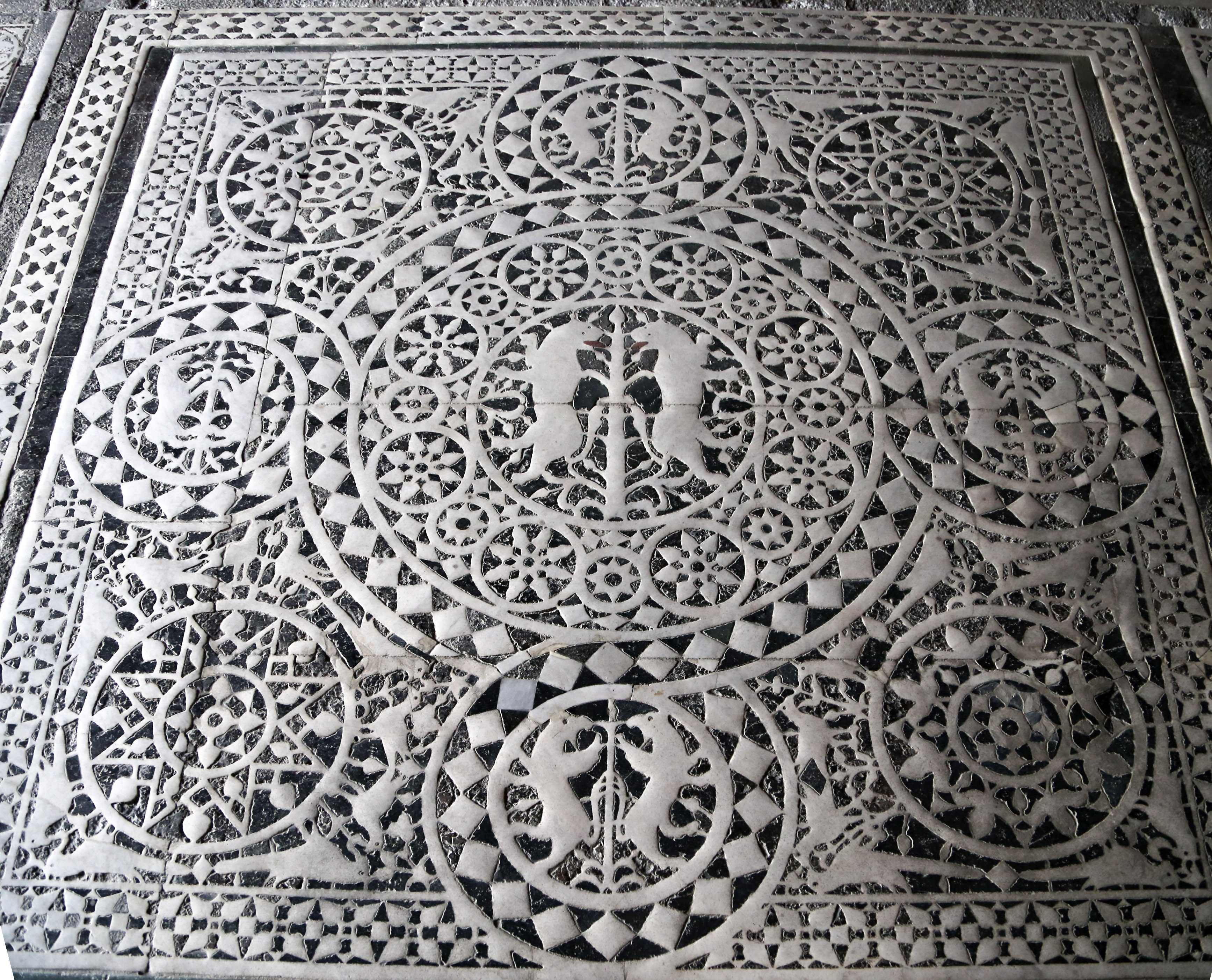 Pavement de l'église San Miniato, à Florence. Zodiaque.